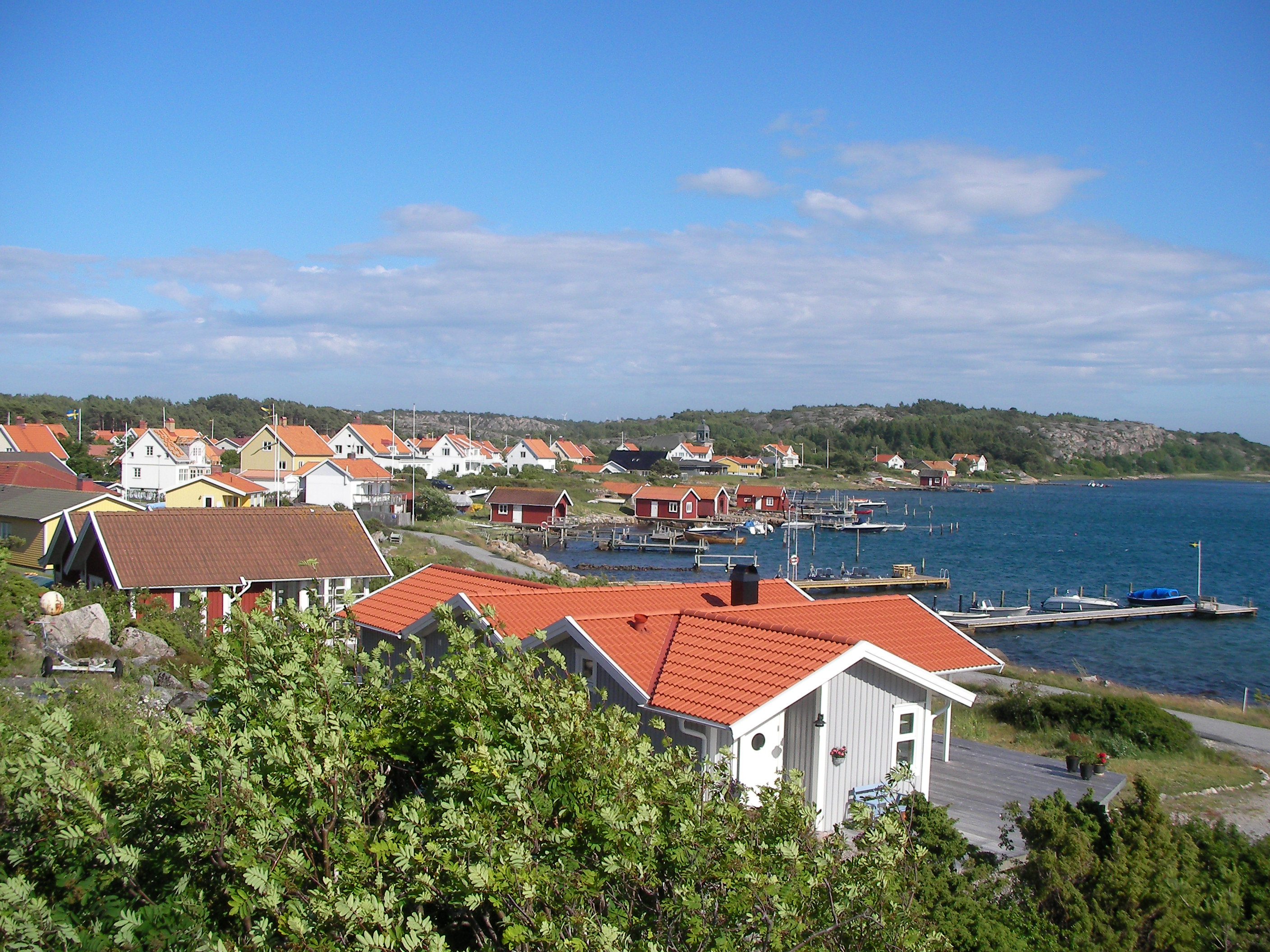 Vy över östra Havstenssund.